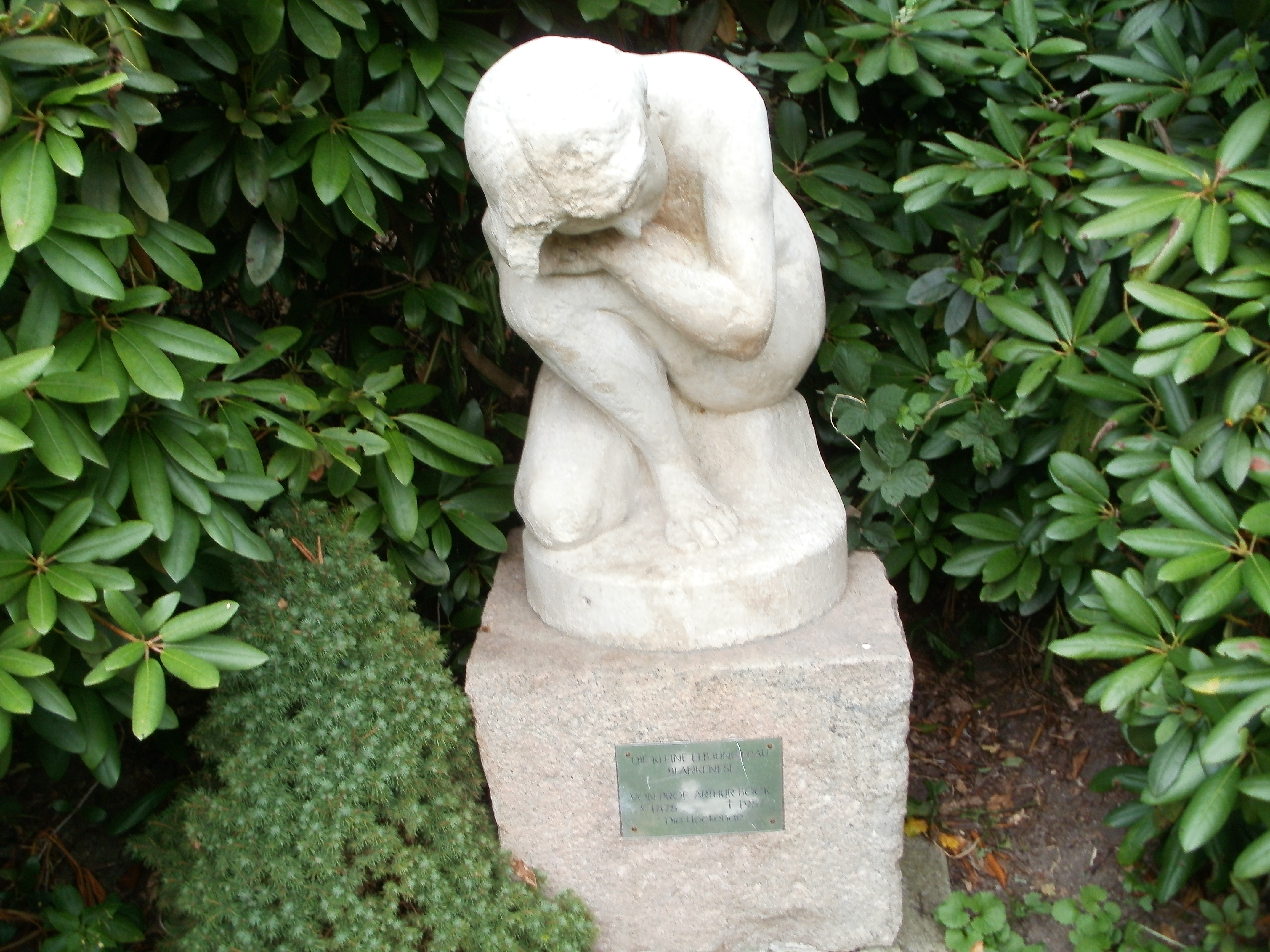 Marmor-Skulptur „Die kleine Elbjungfrau“ (um 1926) von Arthur Bock (1875–1957) im Hessepark Hamburg-Blankenese